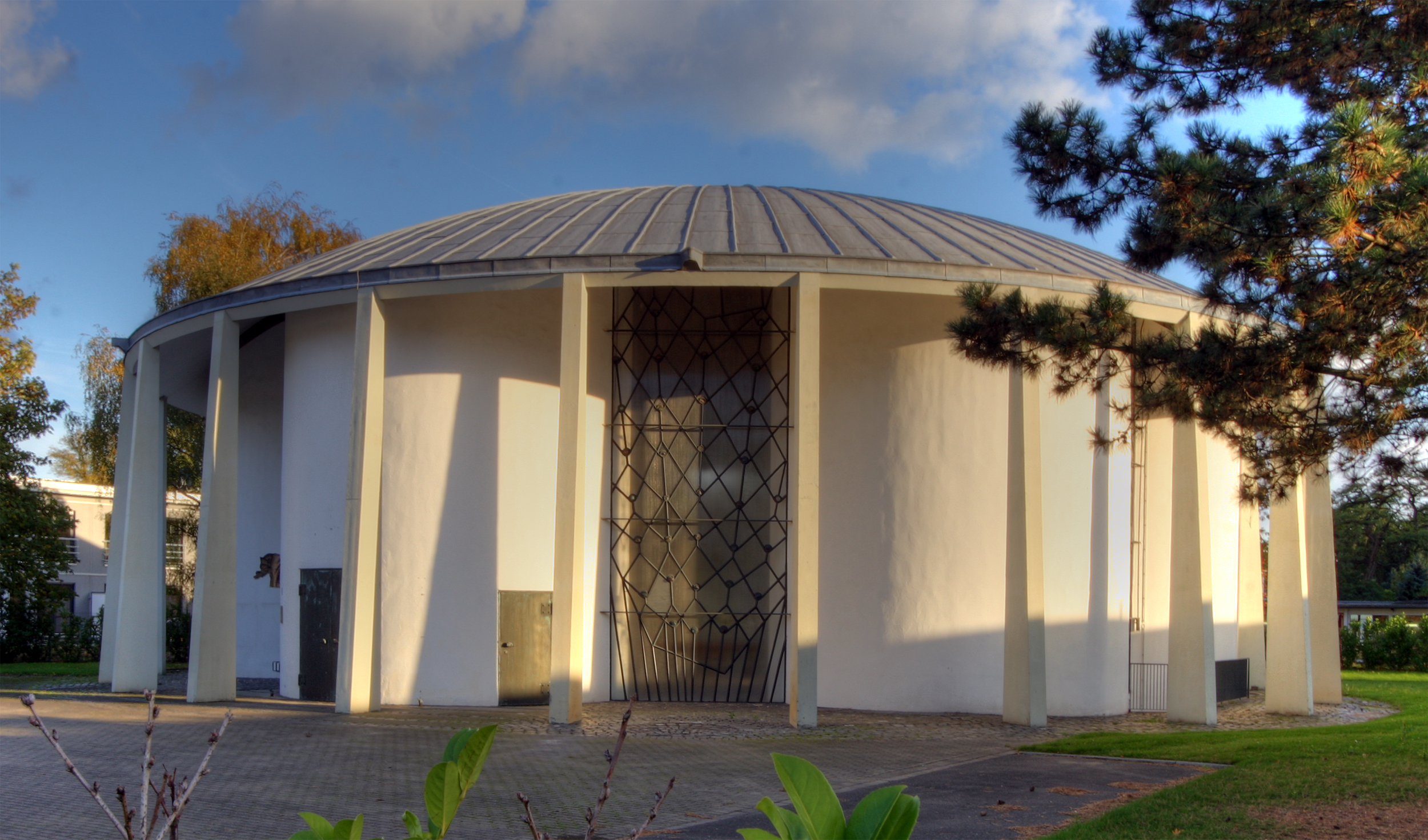 Hürth-Kalscheuren, St. Ursula. Architekt: Gottfried Böhm